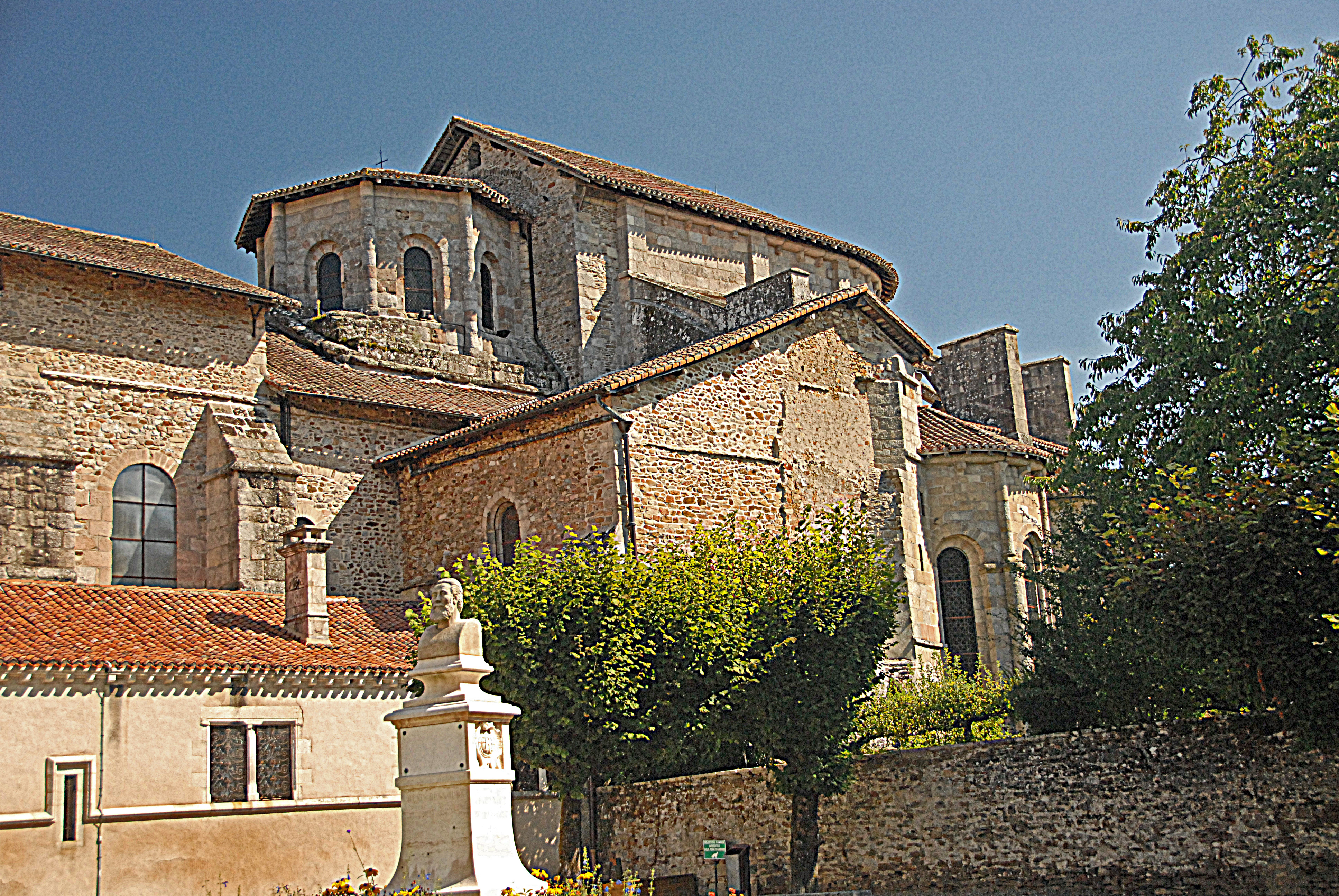 Stiftskirche St.-Léonard-de-Noblat von SW, Lang- u. Querhaus,u. Chorhaupt